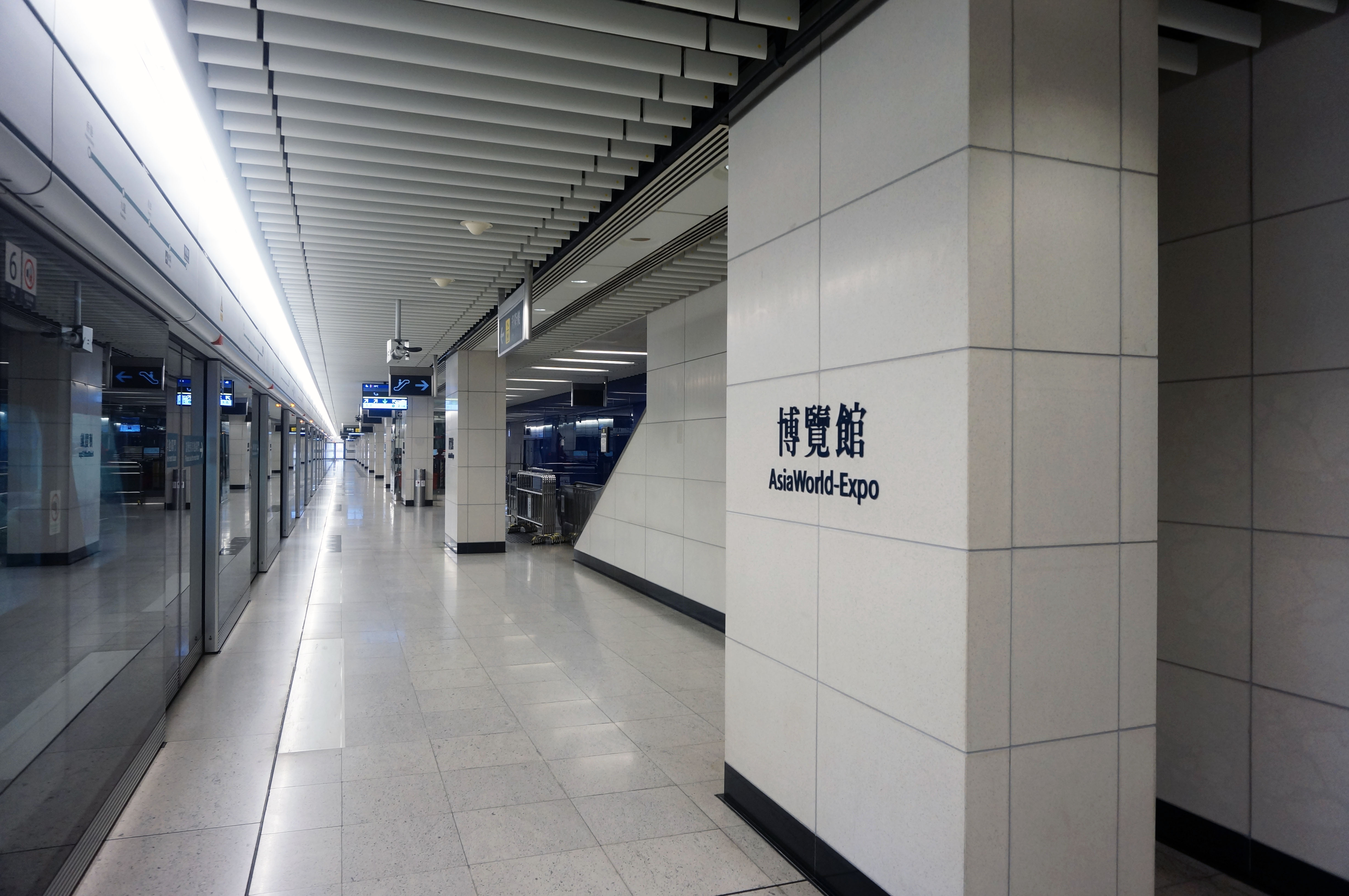 港鐵博覽館站月台